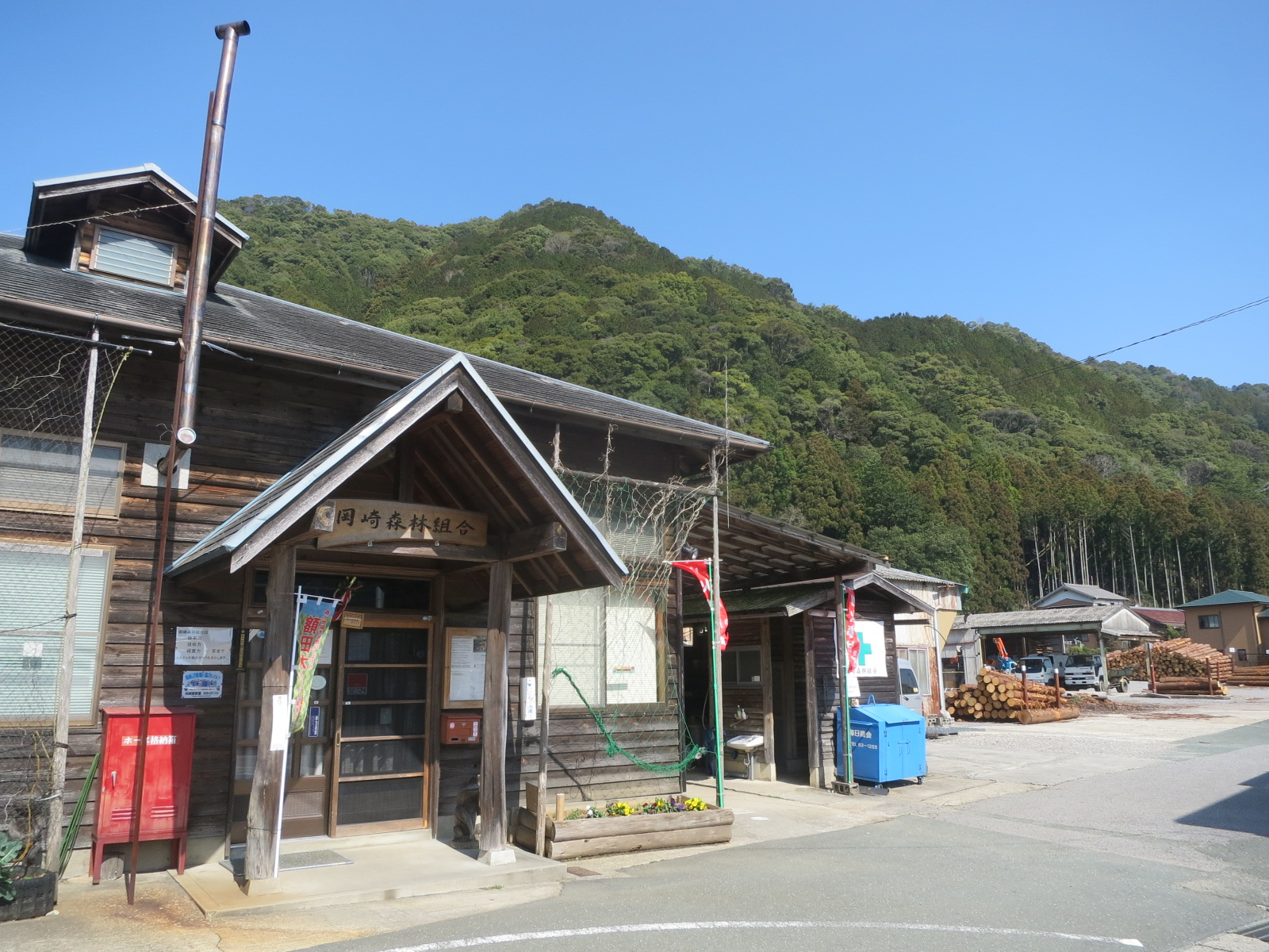 岡崎森林組合（岡崎市明見町）